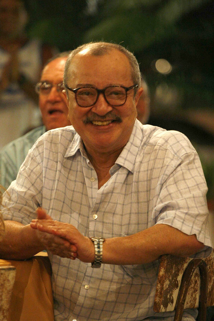 O escritor baiano João Ubaldo Ribeiro comemorou no dia 23 de janeiro, na Ilha de Itaparica, o seu aniversário de 68 anos, ao lado de familiares e amigos.